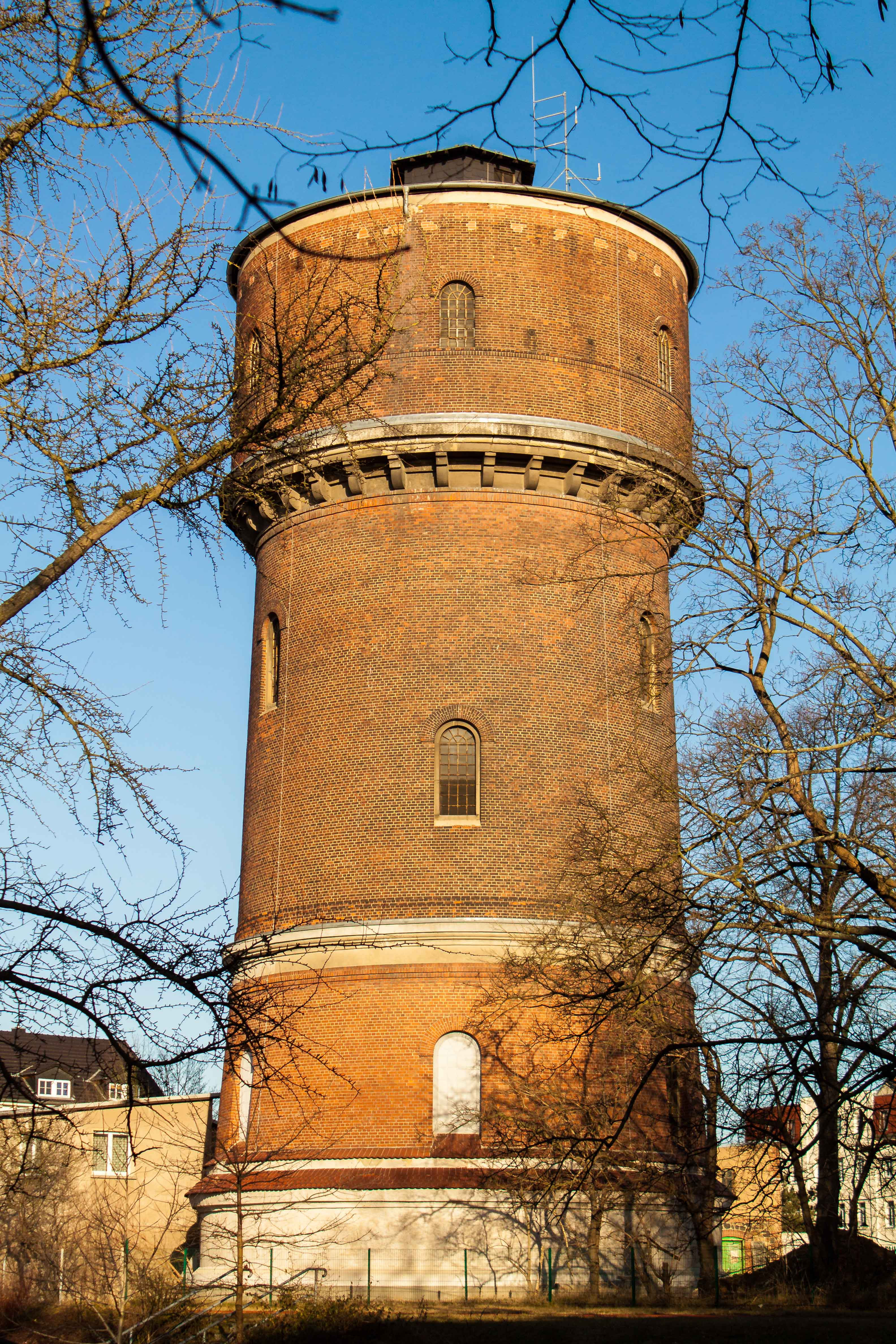 Wasserturm, Clara-Zetkin-Platz 8 in Wurzen